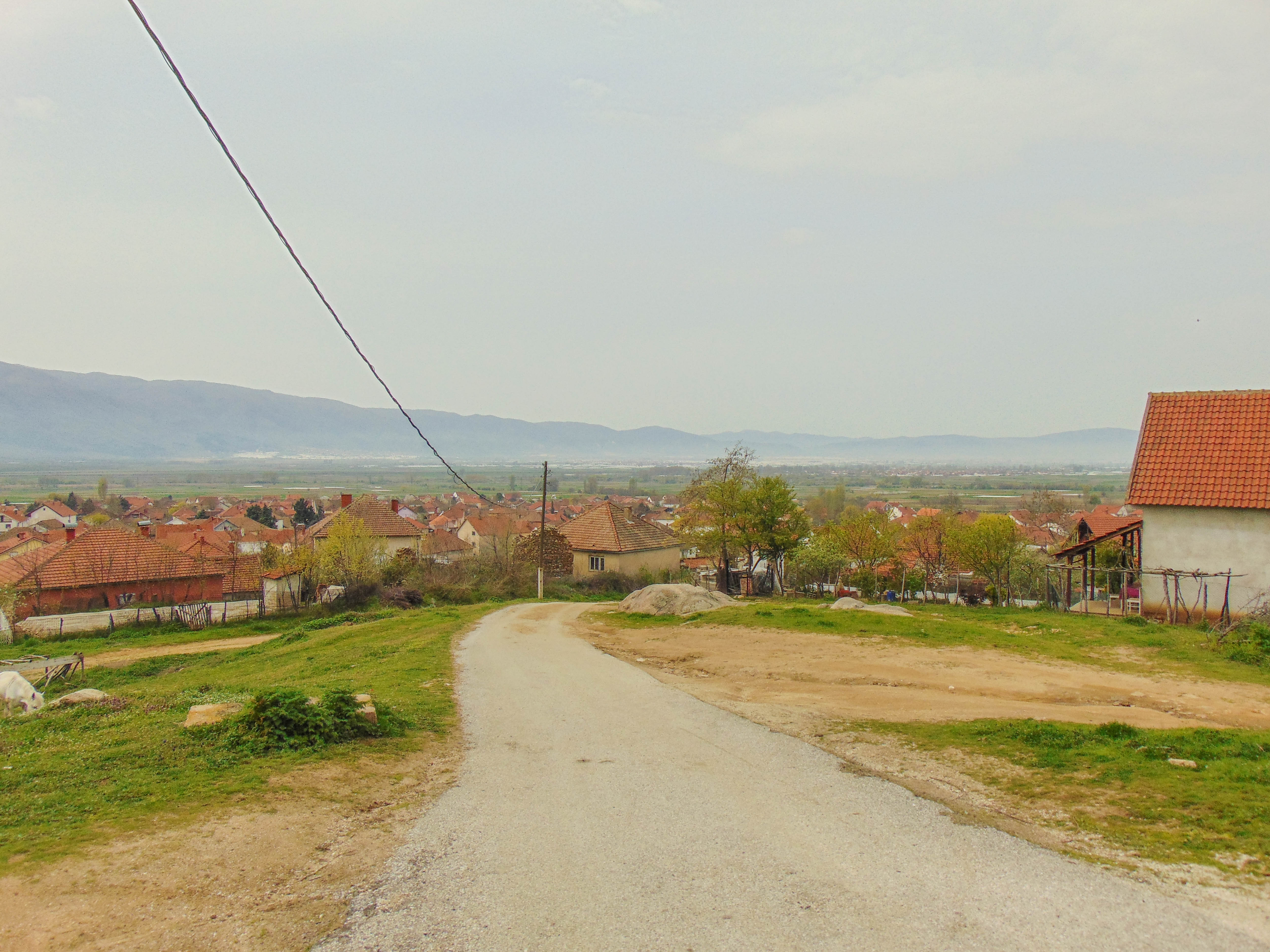 Сушица